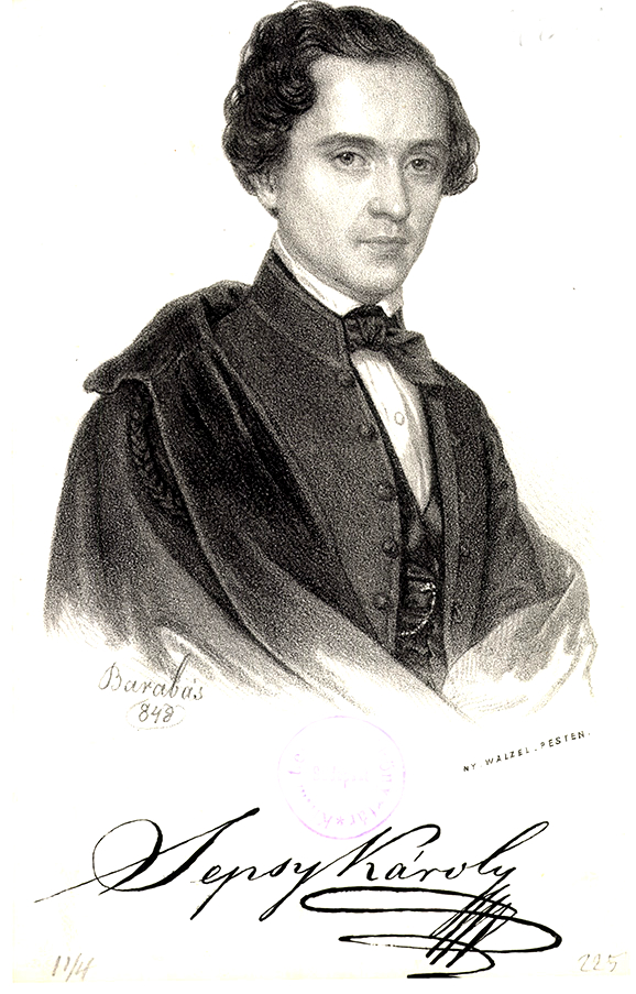 Sepsy Károly (Szatmárnémeti, 1822 – Szatmárnémeti, 1853. dec. végén): színész, színigazgató. 1838-ban Máramarosszigeten lépett színpadra, ettől fogva mint színész, majd mint ig. bejárta az egész országot. 1841-ben Ozorán Petőfi az ő társulatánál lett vándorszínész.